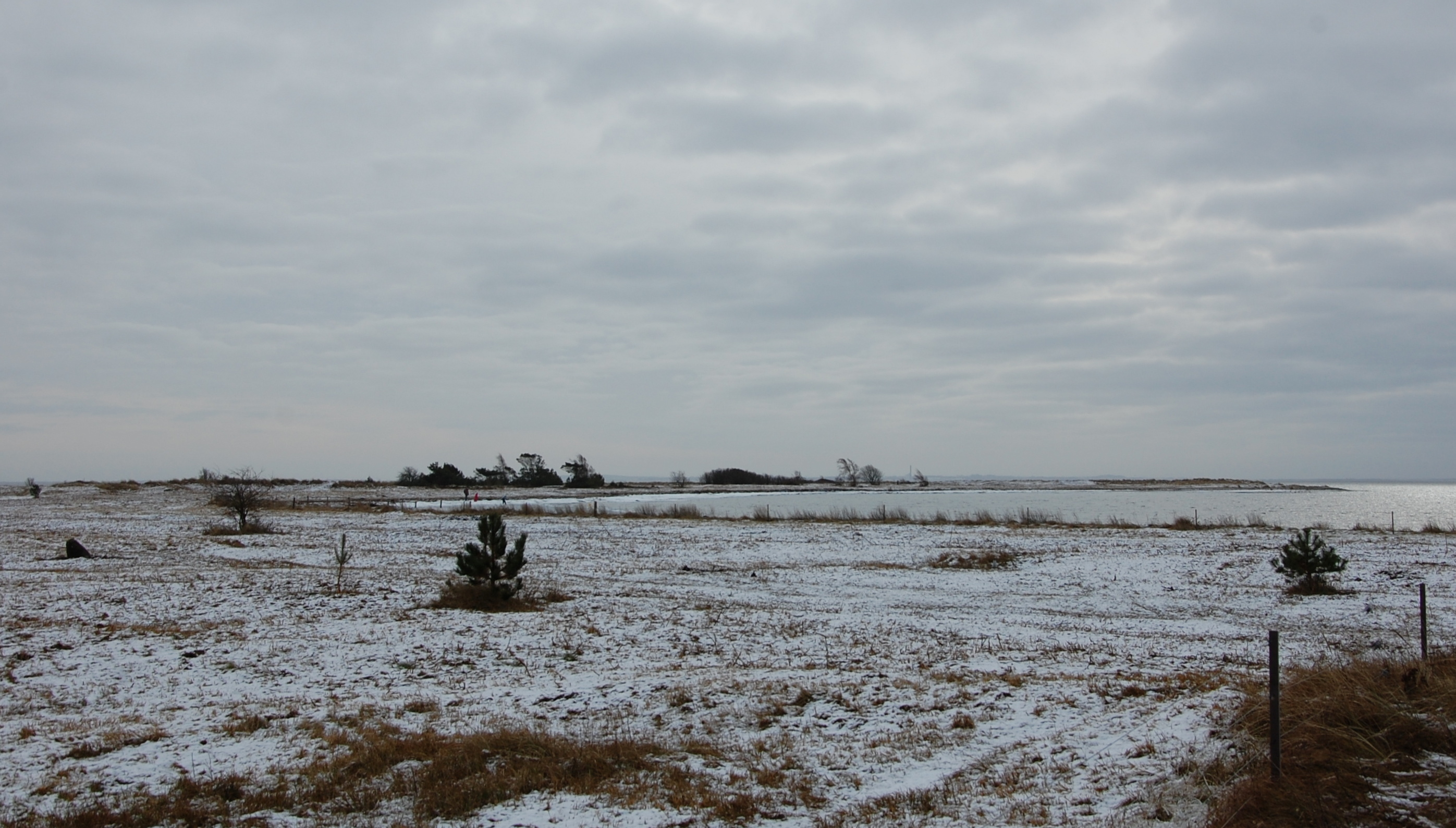 Skansehagen